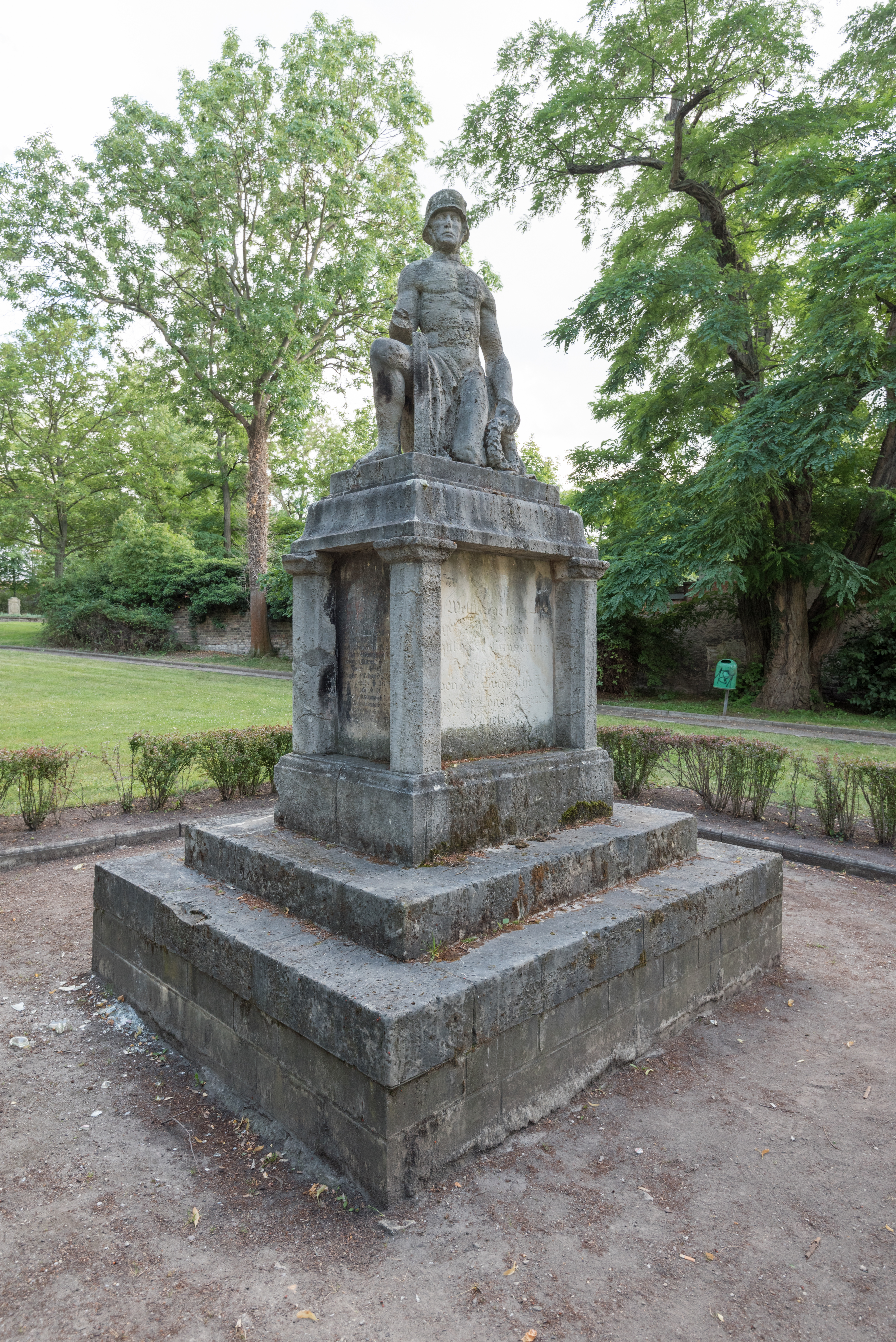 Mücheln, Oeltor, Kriegerdenkmal 1914-18.